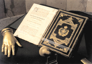 Foto da Constituição Imperial do Brasil, de 1824.